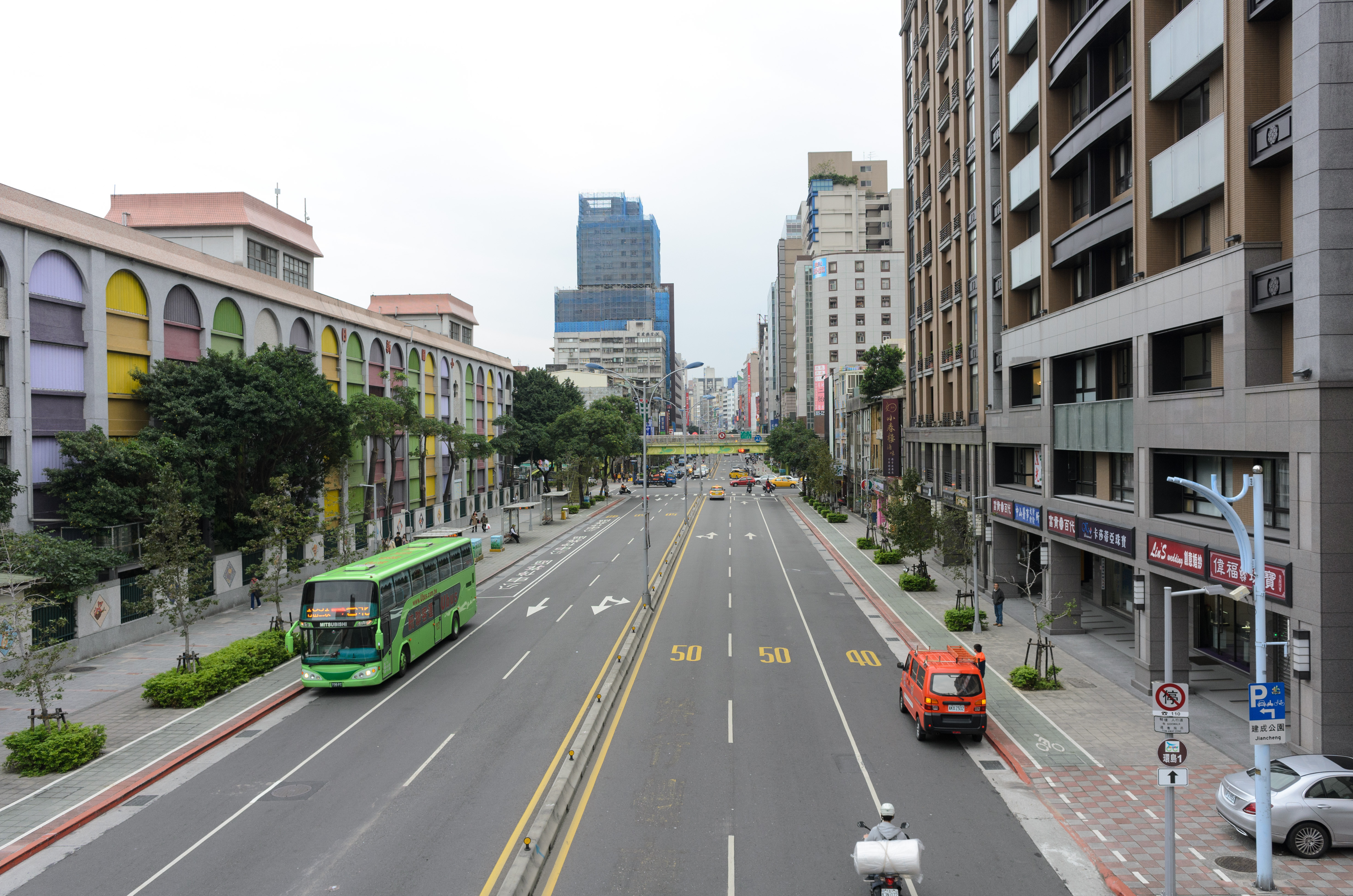 中文（台灣）: 從臺北市大同區南京西路與太原路路口天橋東向俯望南京西路，左側（南方）是日新國小。